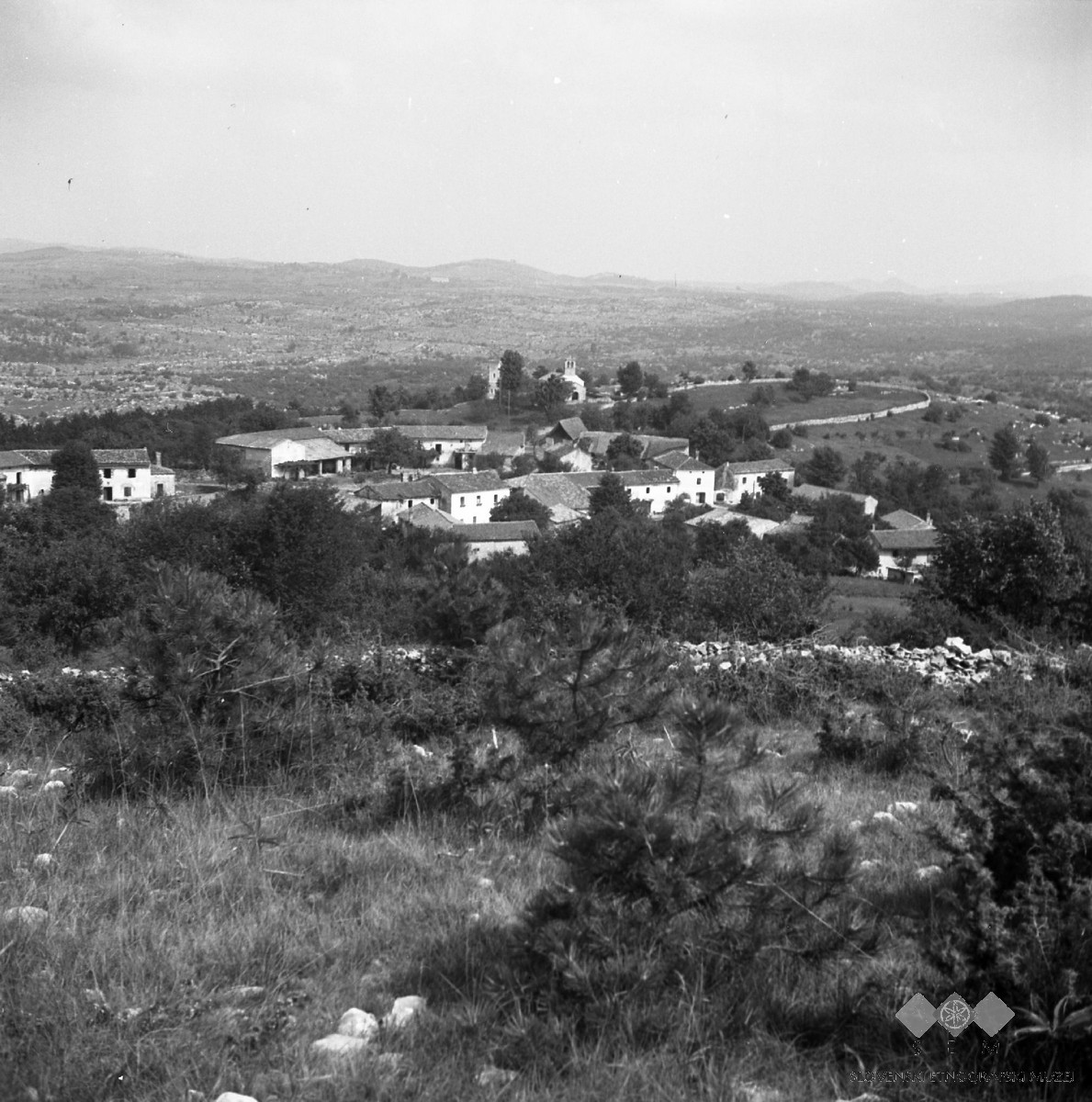 Vas Skadanščina.